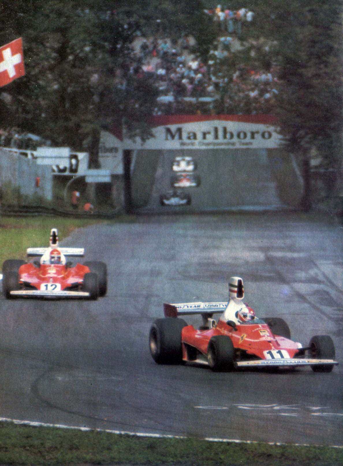 Monza, Autodromo Nazionale, 7 settembre 1975. XLVI Gran Premio d'Italia. I due piloti della Scuderia Ferrari, lo svizzero Clay Regazzoni (n. 11) e l'austriaco Niki Lauda (n. 12), a bordo delle loro Ferrari 312T.Original caption: "Dopo pochi giri si profila il predominio delle vetture rosse. All'entrata della variante Mirabello, Regazzoni e Lauda sono già nettamente staccati da Reutemann, Fittipaldi ed Hunt, rallentati anche dall'incidente in chicane del primo giro."